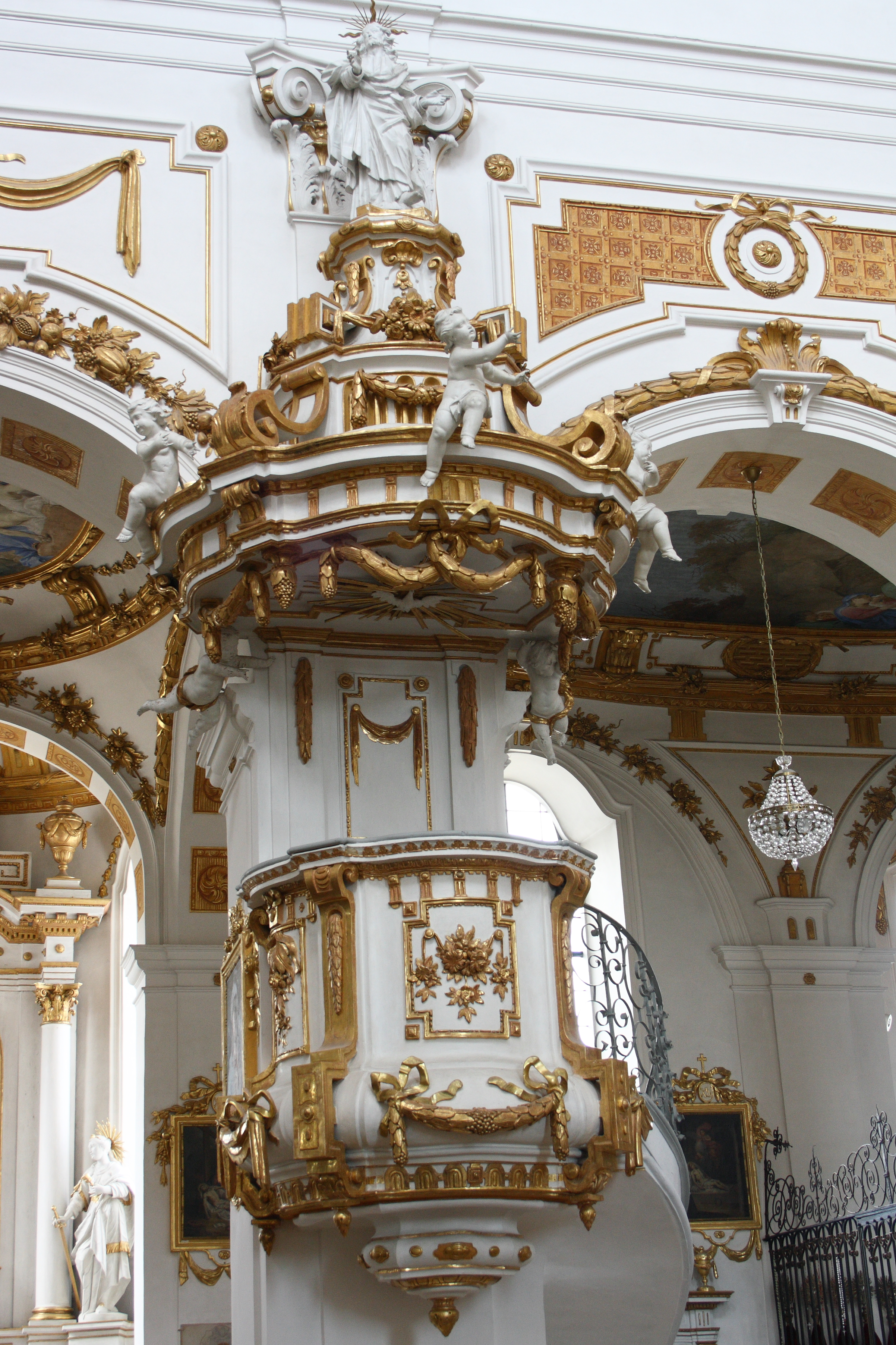 Katholische Pfarr- und Wallfahrtskirche St. Peter und Paul in Oberelchingen, einem Ortsteil von Elchingen im Landkreis Neu-Ulm (Bayern), Kanzel